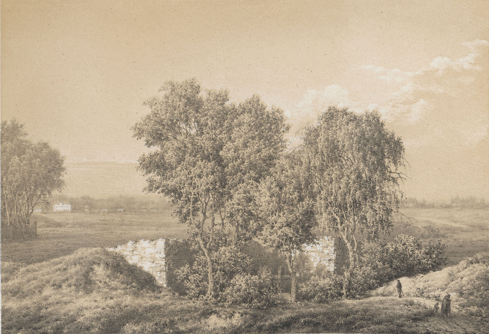 Беларуская (тарашкевіца): Кнышын (Knyšyn). Замак